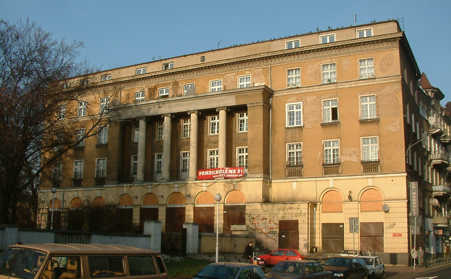 Former "Magnolia" restaurant in Poznań